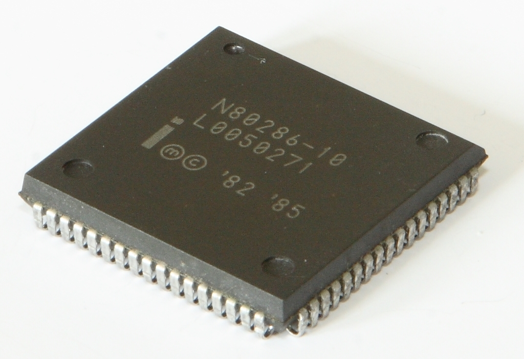 Intel 80286 68 Pin 10Mhz